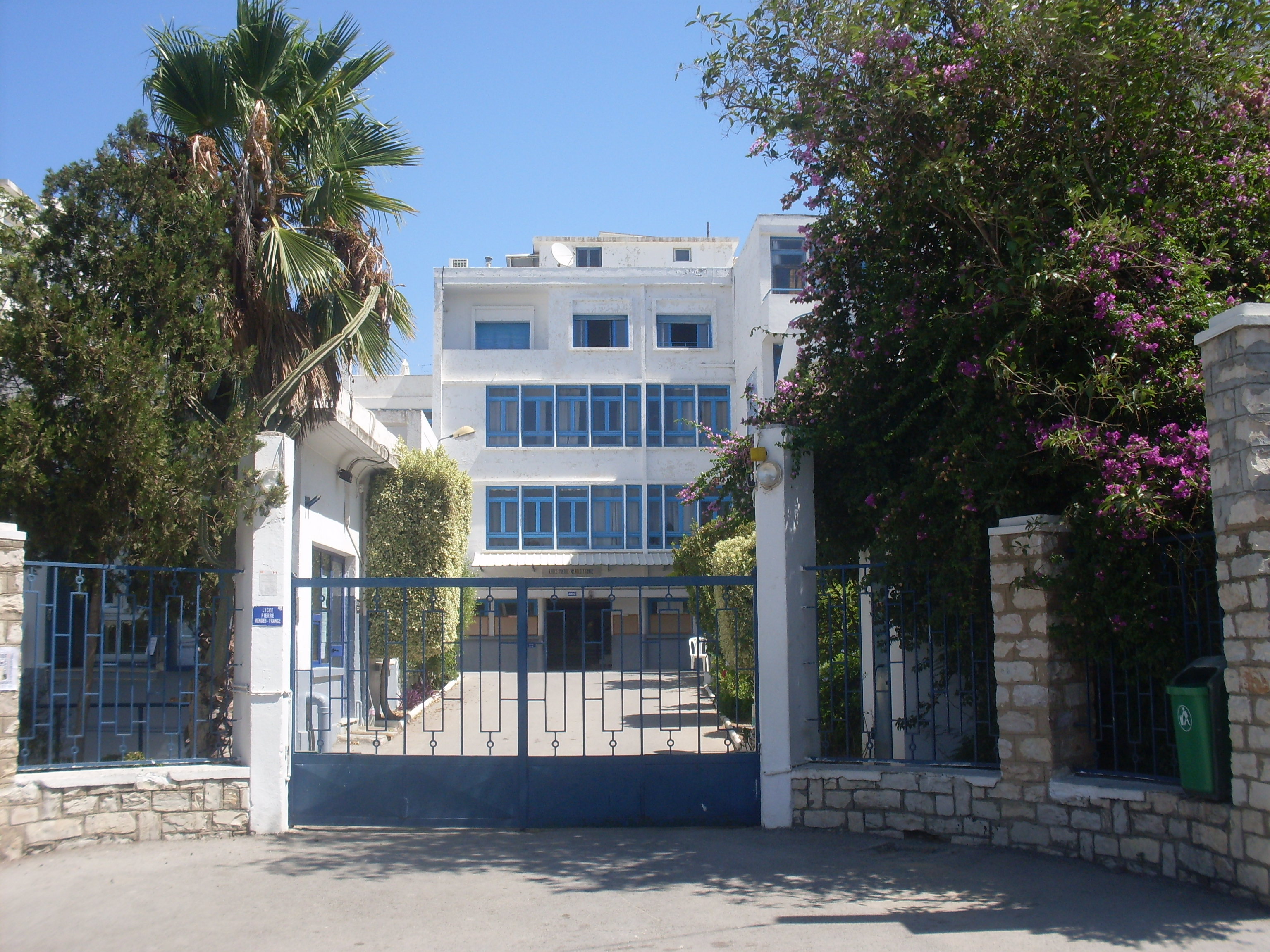 Tunisie, Lycée pièrre Mendès France, Mutuelleville